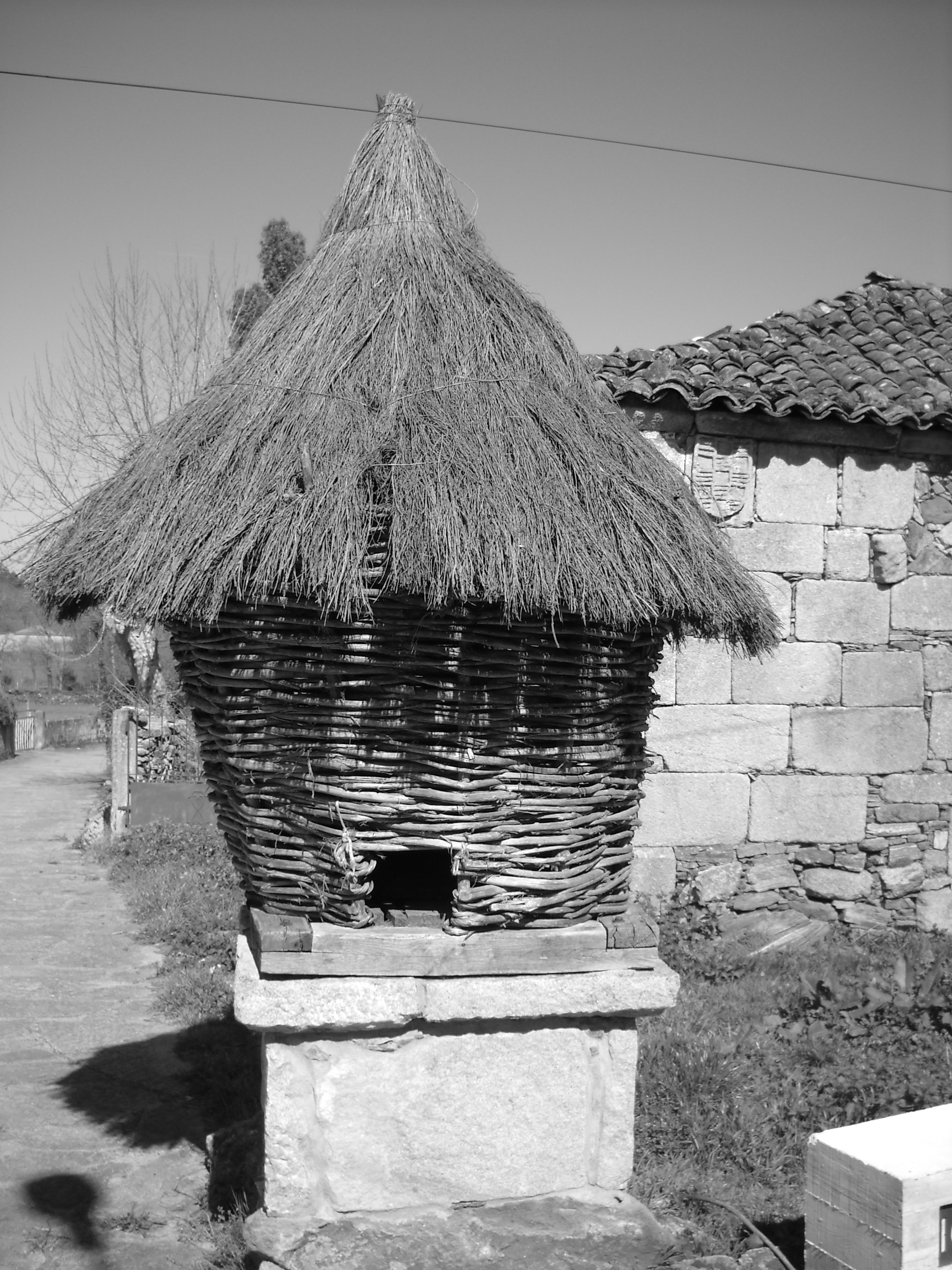 Cabazo, O Leboreiro, O Leboreiro, Melide